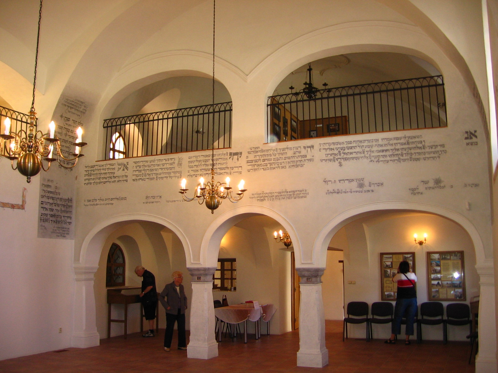 Severozápadní část hlavního sálu synagogy v Dolních Kounicích se starší ženskou tribunou. (en:) The north-west part of main hall of synagogue in Dolní Kounice with older women's stand.